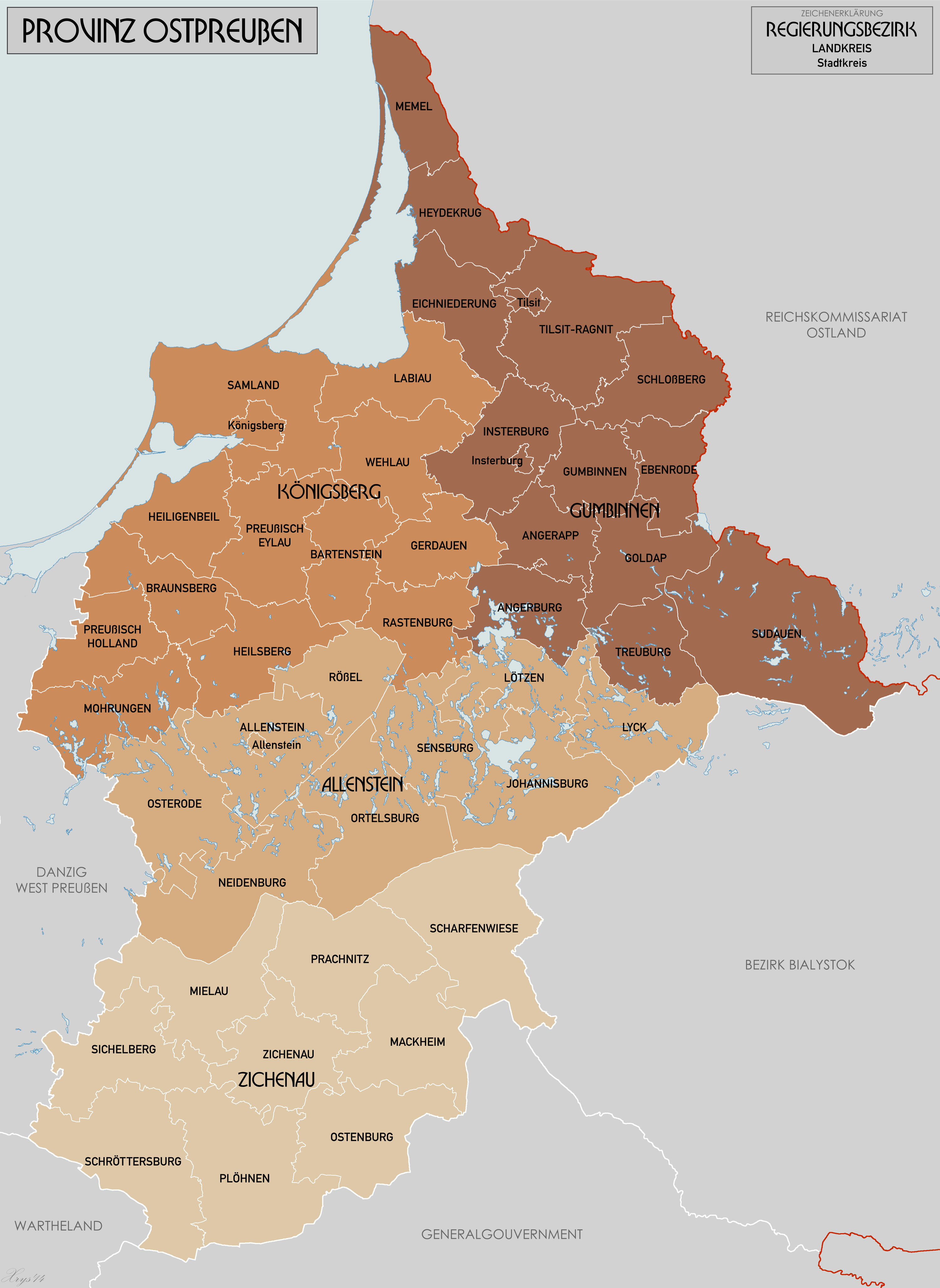 Verwaltungskarte der Provinz Ostpreussen in 1944. Karte digitalisiert aus Karte des Deutschen Reiches 1:100k, Karte von Mitteleuropa 1:300k. Einiges Quellen aus WIG (